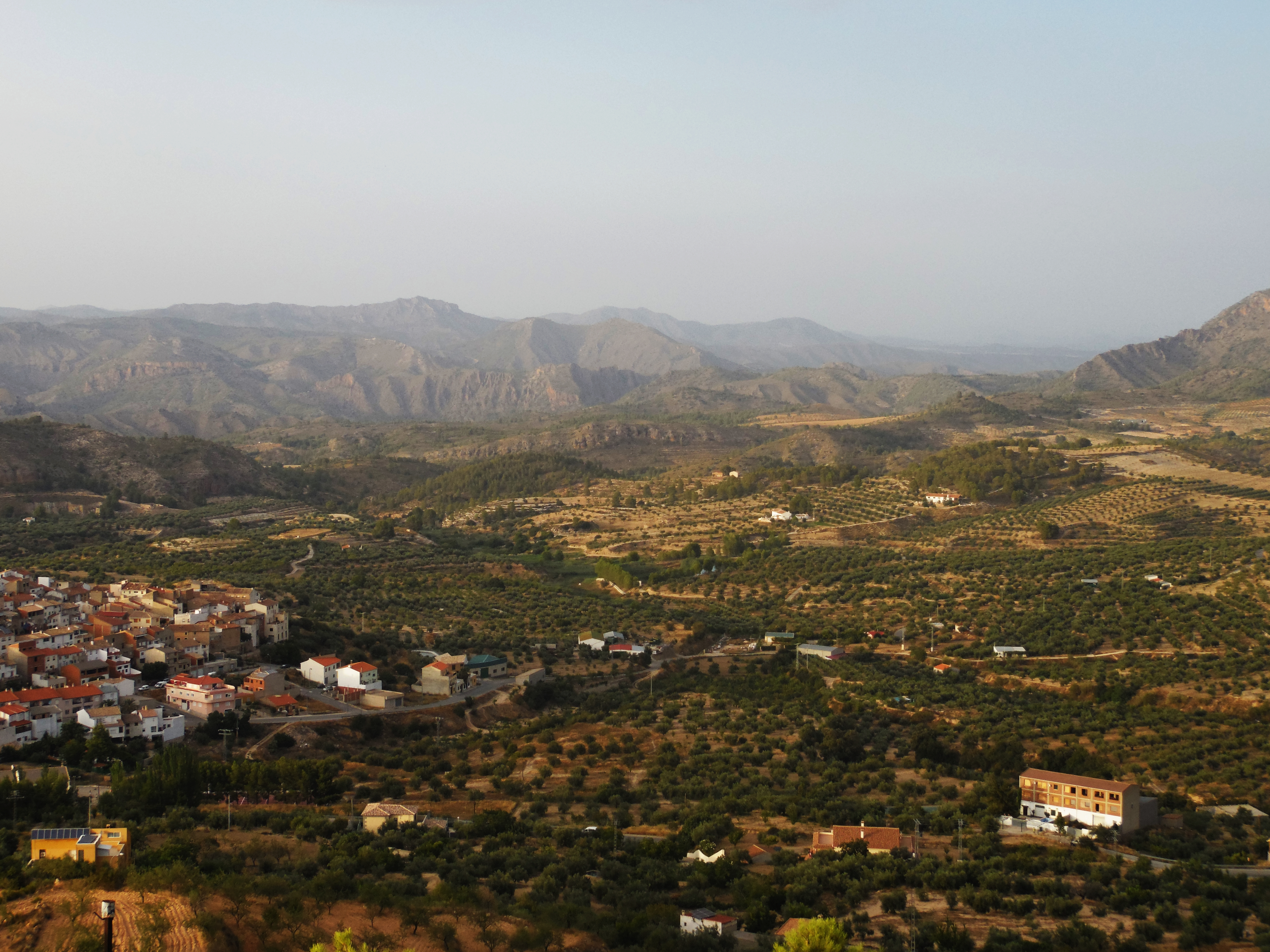 Sierra de Alcaraz y Segura y cañones del Segura y del Mundo This is a photography of a Special Area of Conservation in Spain with the ID: ES4210008. Natura2000 entry, EEA entry